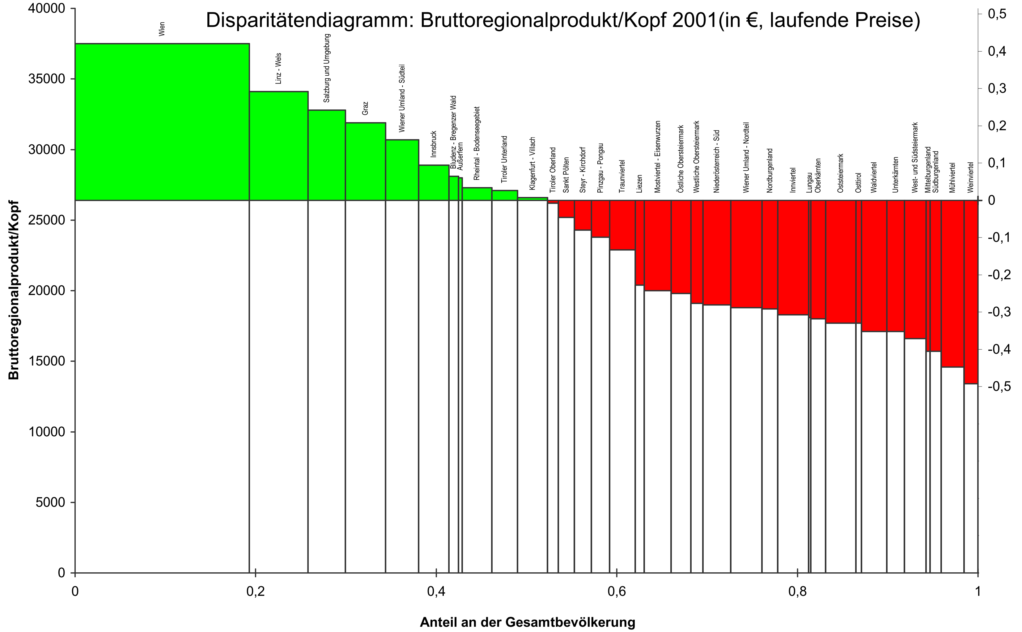 Disparitätendiagramm Bruttoregionalprodukt Österreichs 2001 zu laufenden Preisen auf der Basis der NUTS3-Gebiete. Datenquelle: Statistik Austria